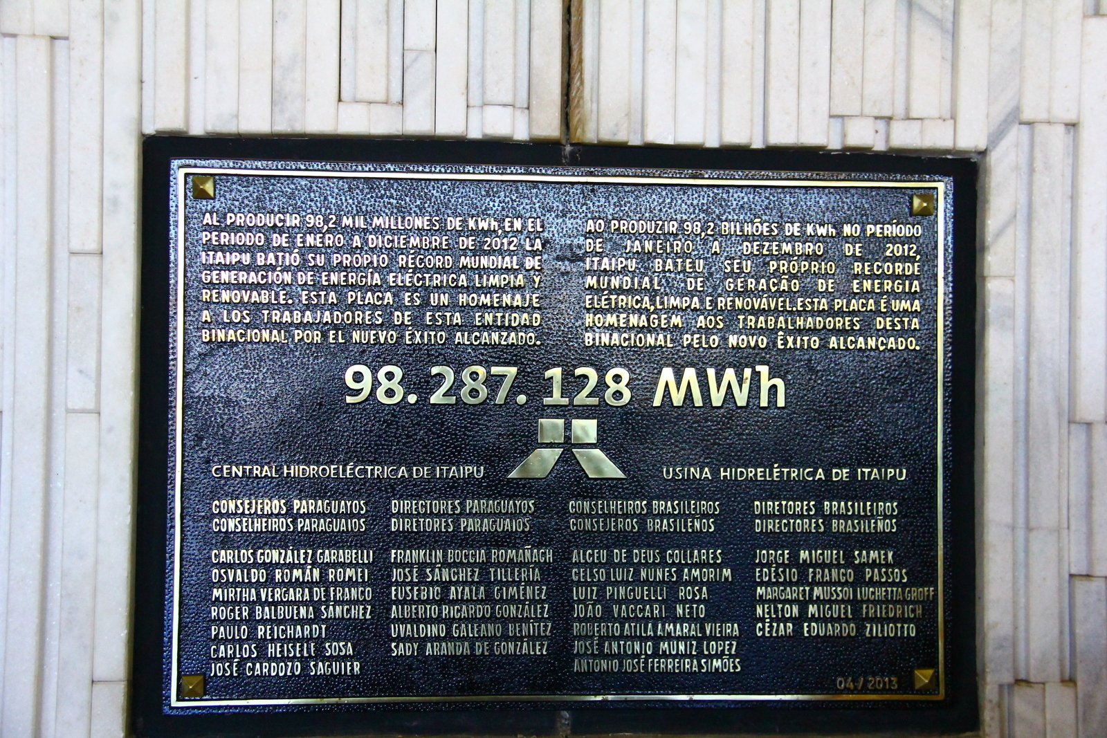 Placa comemorativa em alusão ao recorde de produção de energia. No período de janeiro a dezembro de 2012 foram produzidos 98,2 milhões de KWh, batendo seu próprio recorde mundial de produção de energia.